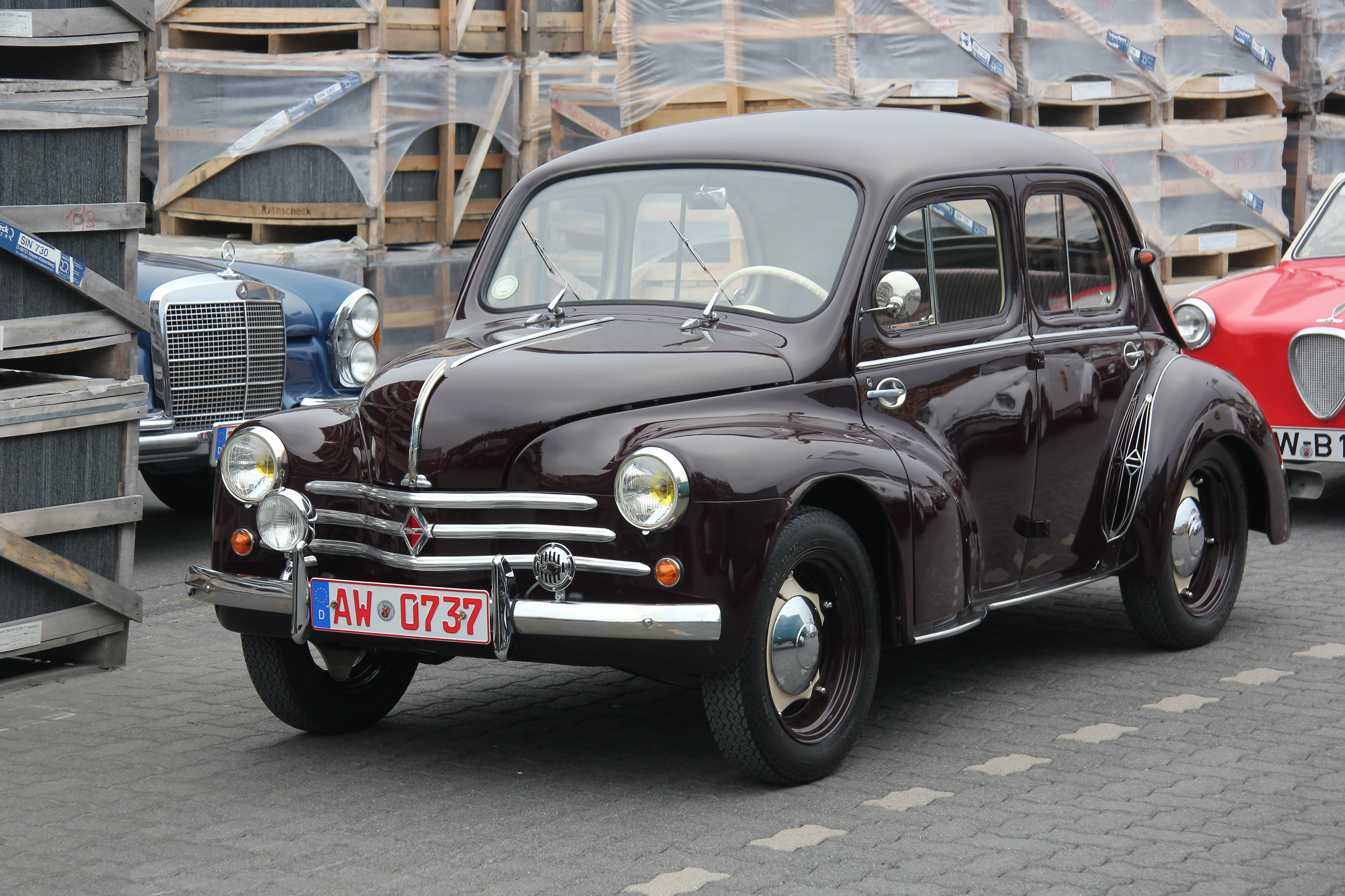 Renault 4 CV, 741 cm³, 21 PS bei 4000/min, Höchstgeschwindigkeit 100 km/h, Bauzeit 1946 bis 1961